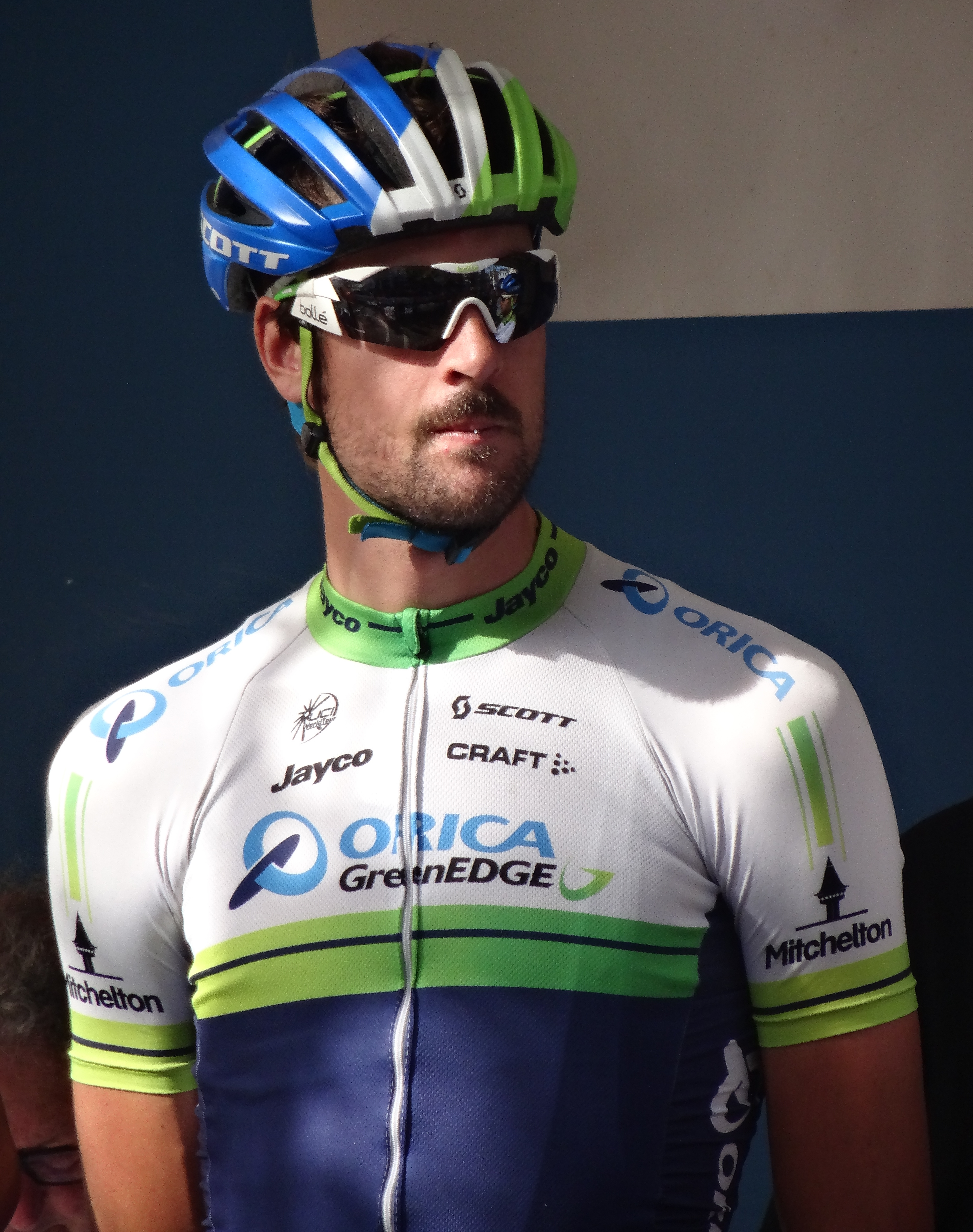 Reportage photographique réalisé le jeudi 2 octobre à l'occasion du départ de la première étape de l'Eurométropole Tour 2014 à La Louvière, Belgique.